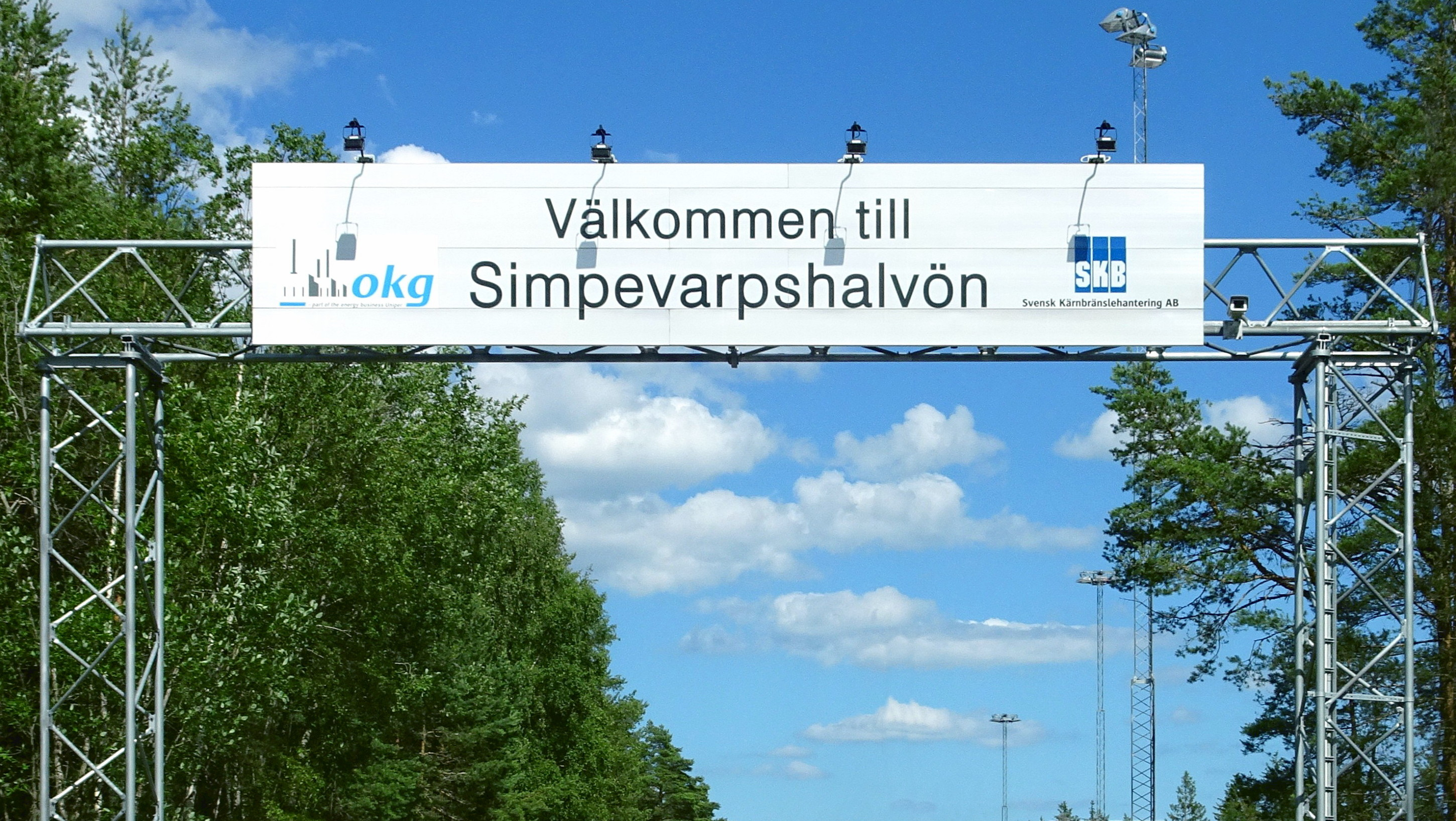 "Välkommen till Simpevarpshalvön" vägspärr vid Oskarshamns kärnkraftverk